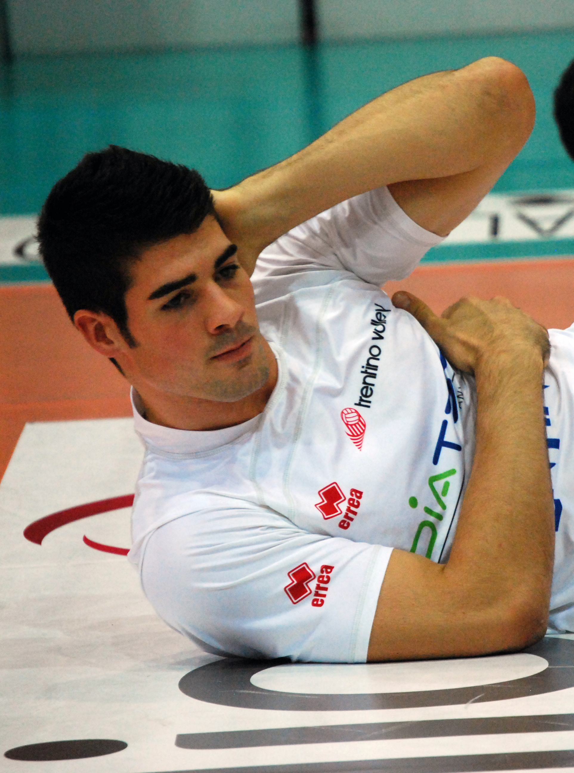 Foto che ho scattato al Palabanca di Piacenza in occasione della partita Copra-Trento